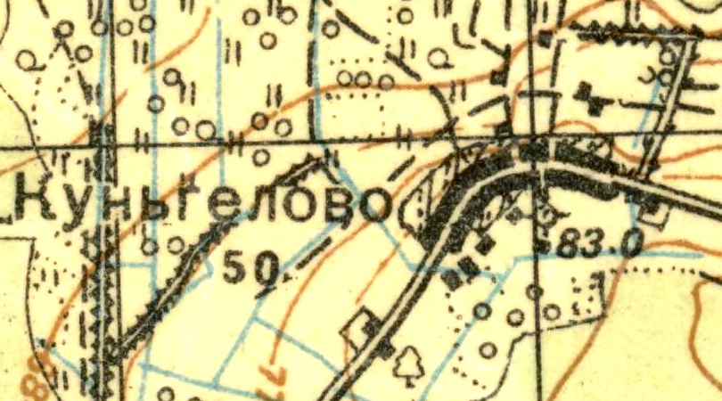 Топографическая карта Ленинградской области, квадрат О-36-14-А (п. Фёдоровский), деревня Куньголово